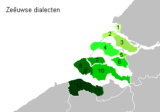 Dialects of Zealandic: Voornes Goereês Flakkees Schouwen-Duvelands Philipslands Tools Noord-Bevelands Walchers Burgerzeêuws Zuud-Bevelands Land van Aksel Land-van-Cadzands